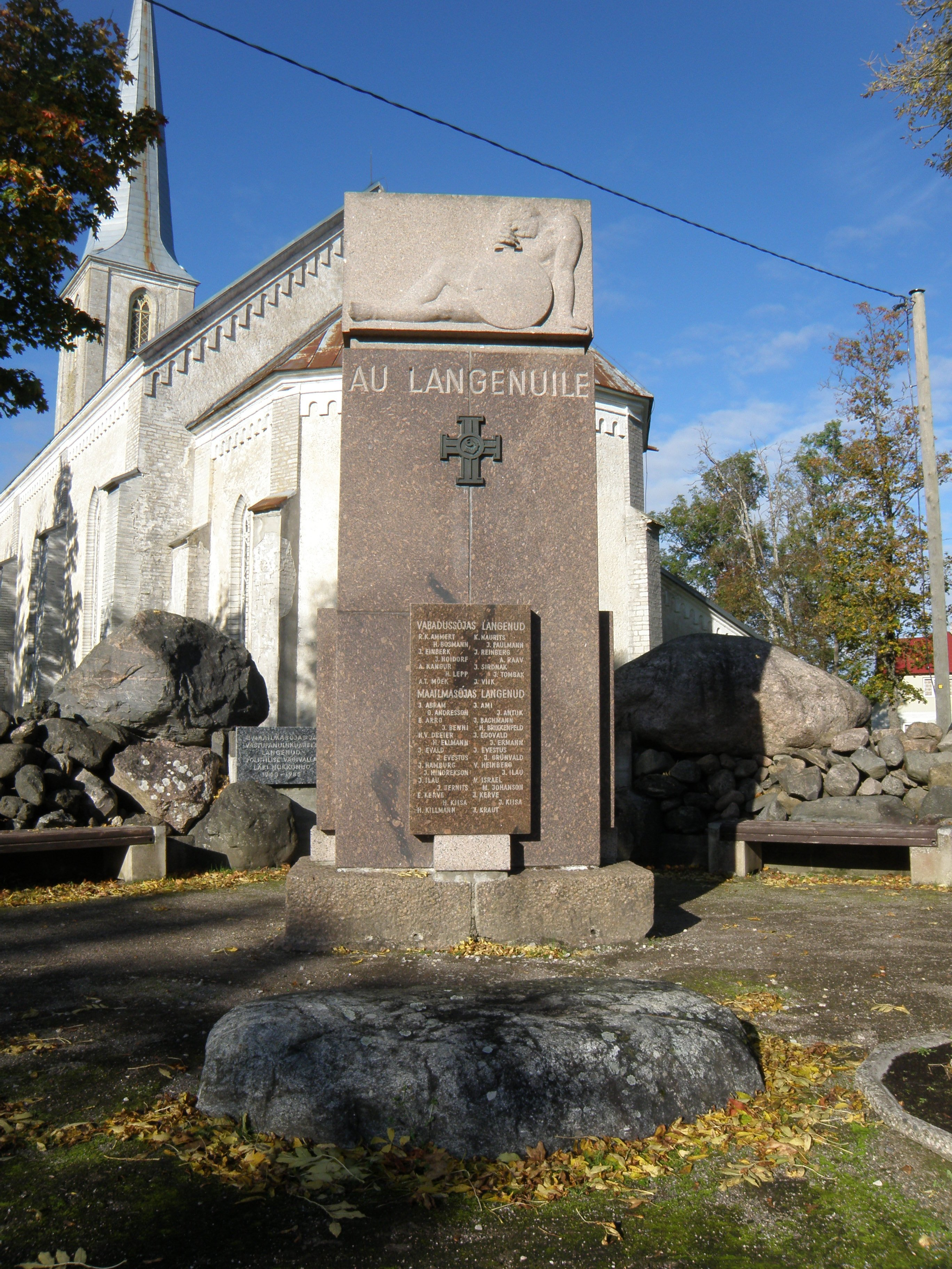 Nissi Vabadussõja mälestussammas